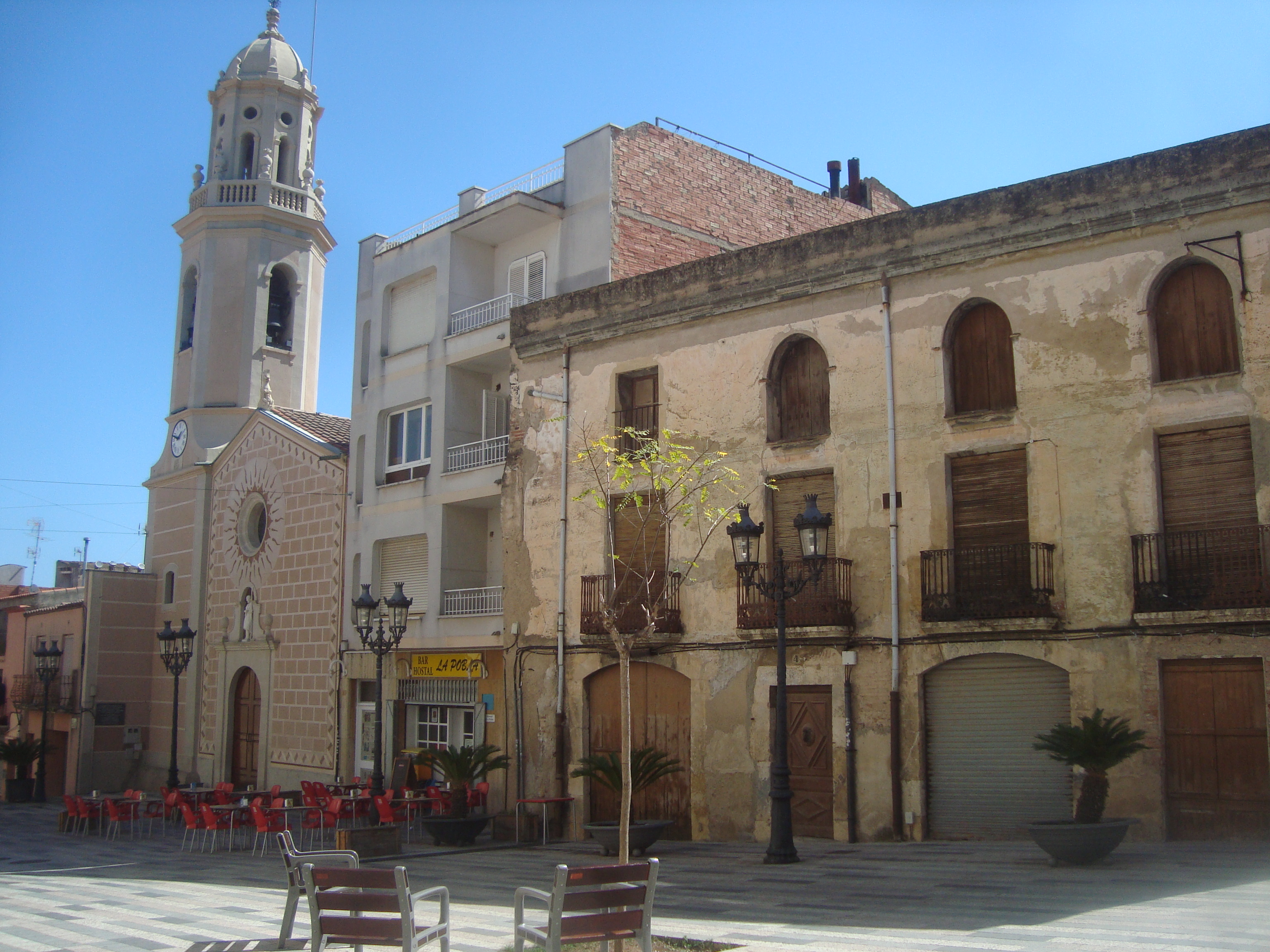 Església parroquial de Sant Joan Baptista